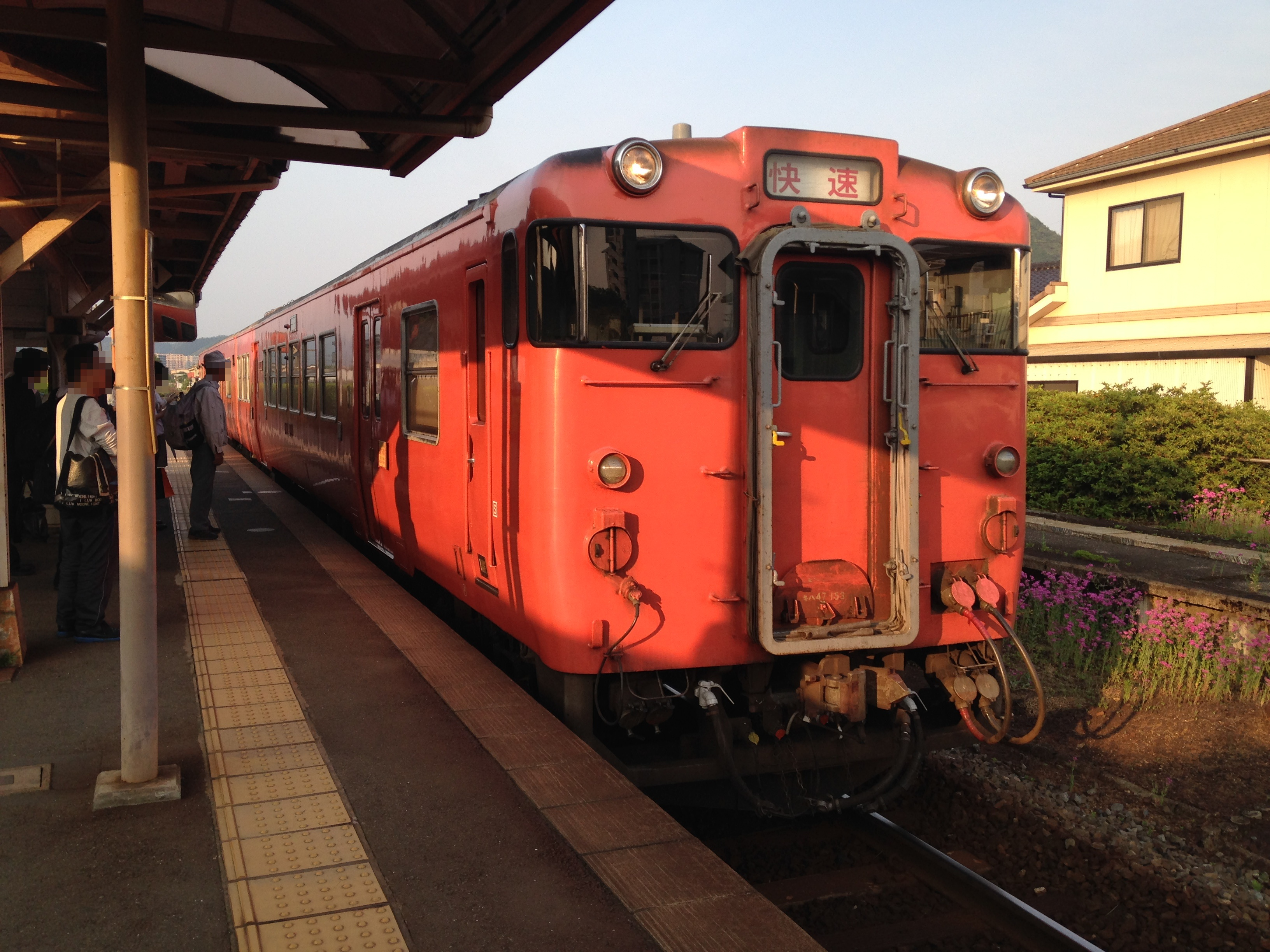 湯田温泉駅に到着する新山口行き快速列車